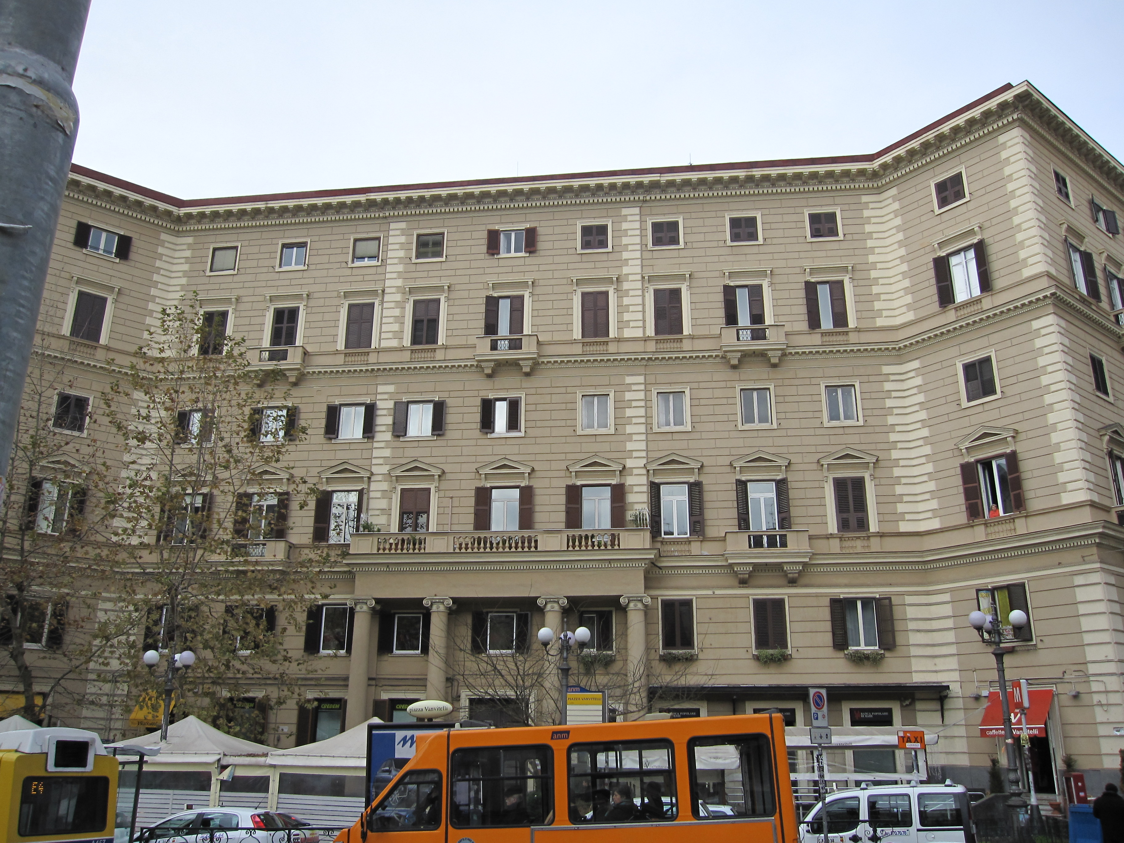 Uno dei quattro maestosi palazzi che si affacciano su piazza Vanvitelli (Napoli)